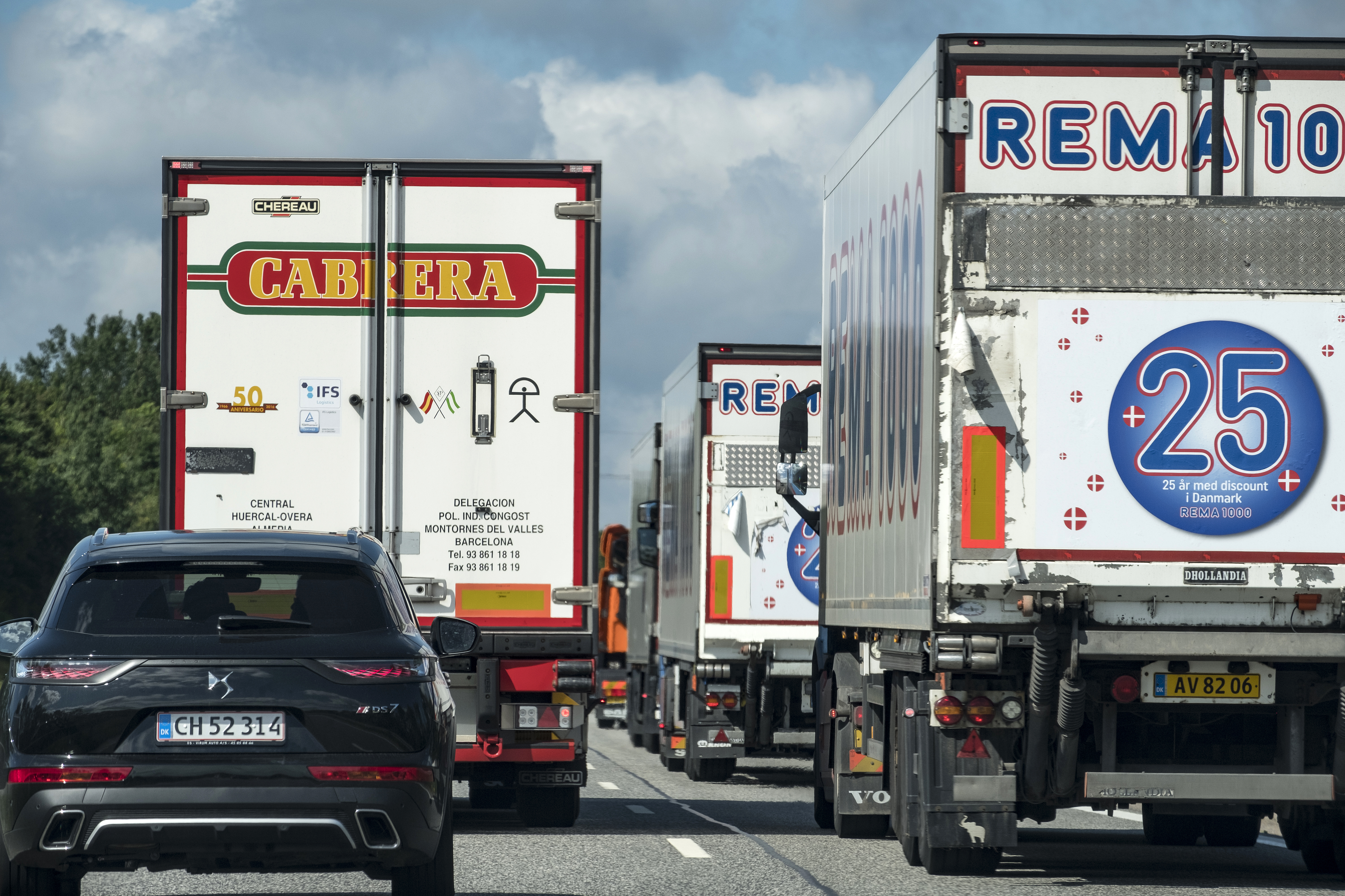 Tät lastbilstrafik på motorvägen E47/E20 från Köpenhamn mot Ringsted. Photo: News Øresund - Johan Wessman © News Øresund - Johan Wessman (CC BY 3.0) Detta verk av News Øresund är licensierat under en Creative Commons Erkännande 3.0 Unported-licens (CC BY 3.0). Bilden får fritt publiceras under förutsättning att källa anges. .The picture can be used freely under the prerequisite that the source is given. News Øresund, Malmö, Sweden News Øresund är en oberoende regional nyhetsbyrå som är en del av det oberoende dansk-svenska kunskapscentrat Øresundsinstituttet.